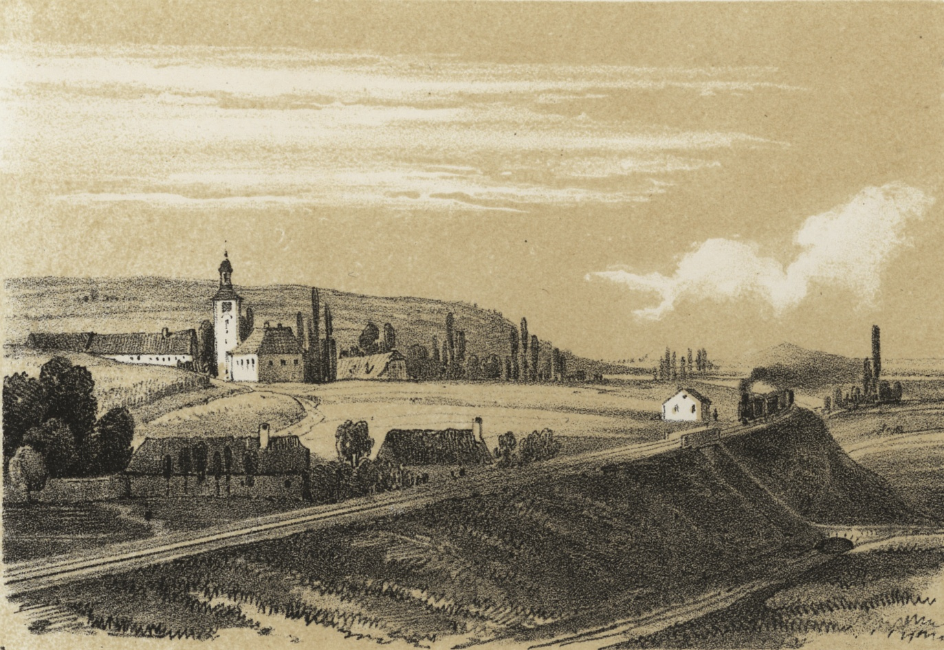 Hostavice